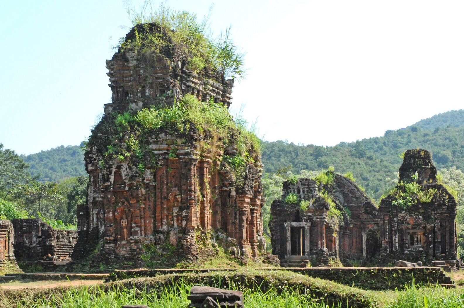 Les temples Cham de My Son (groupes B,C,D). L'édifice au premier plan (C1) date du VIIIème siècle, il était dédié à Shiva, représenté sous forme de LInga.